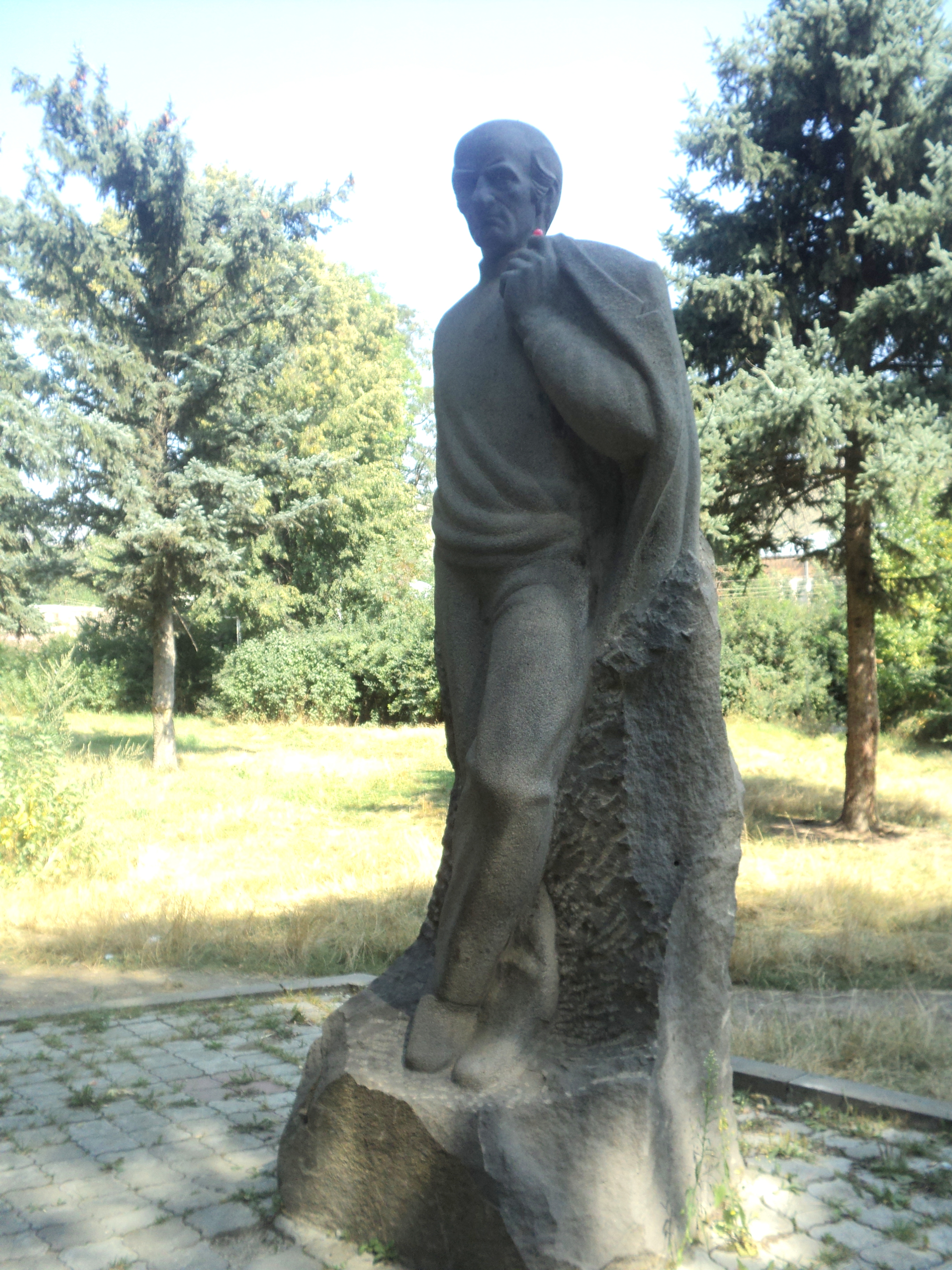 Գտնվում է Կայարանամերձ երկաթուղայինների զբոսայգում 1/48